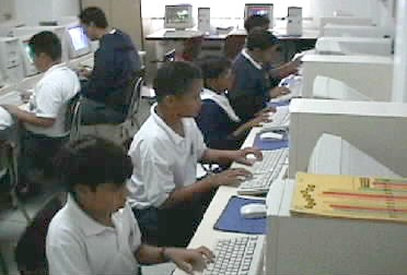 egundo Laboratorio de Informatica del Colegió Americano